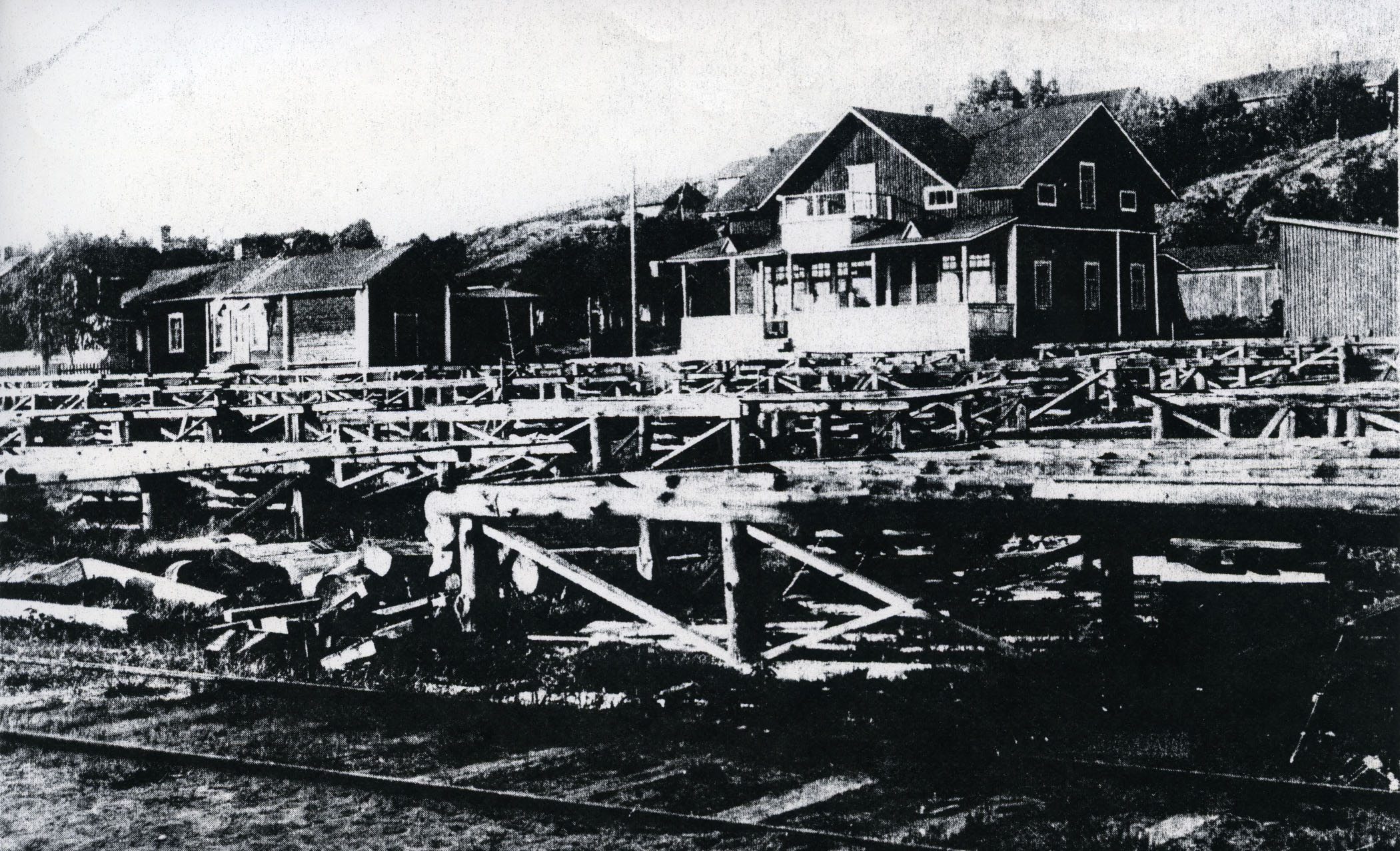 Общий вид разъезда Хауккаваара, 1920-е годы.